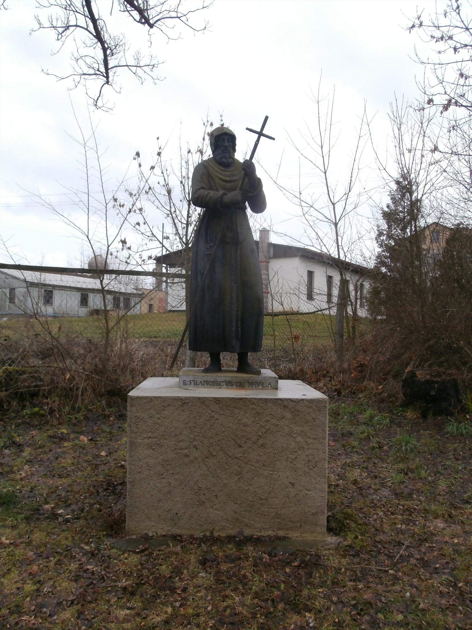 Socha sv. Františka de Paula, Slabce, na křižovatce Svinařov - Modřejovice